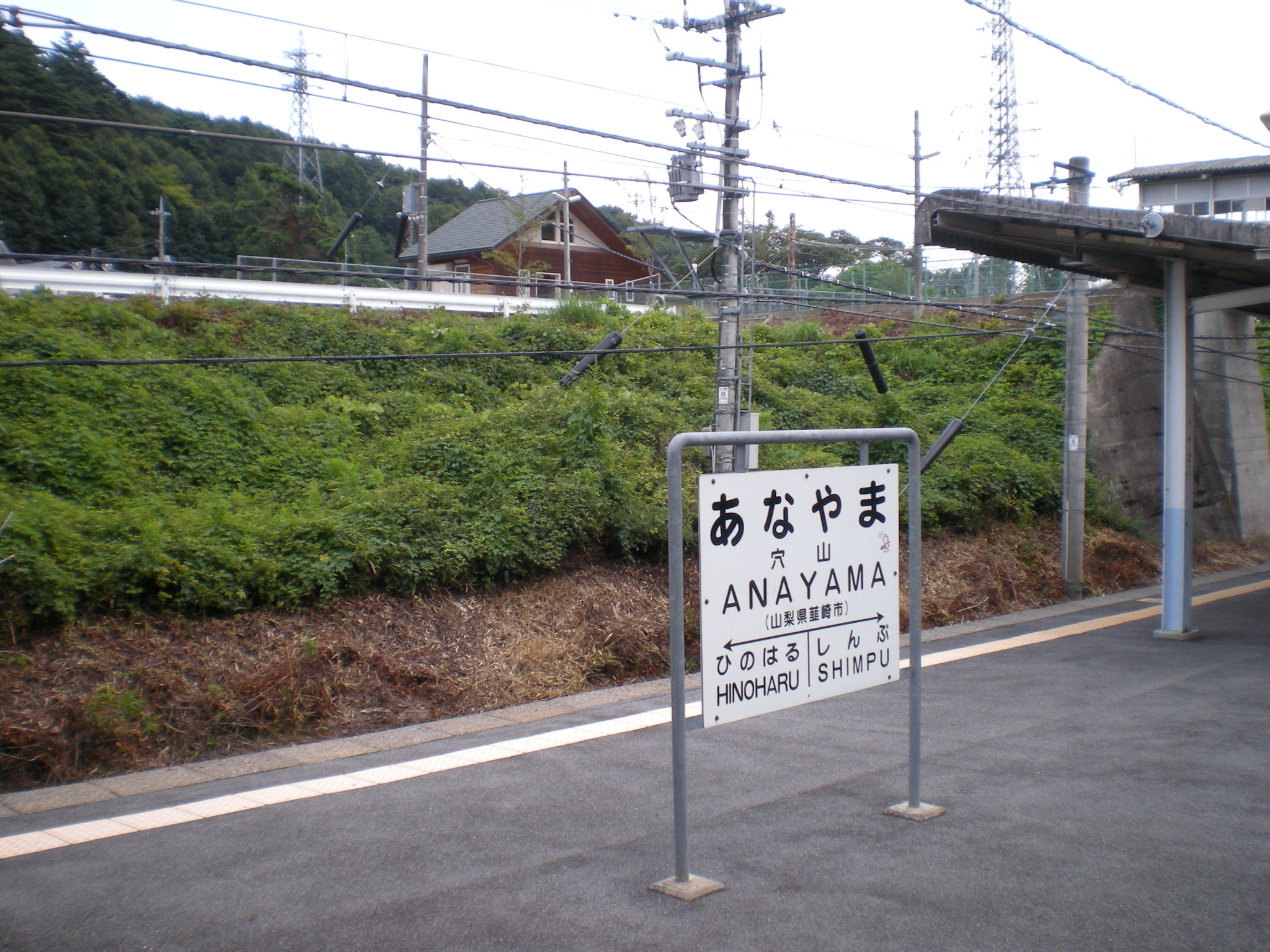 JR穴山駅(Anayama)